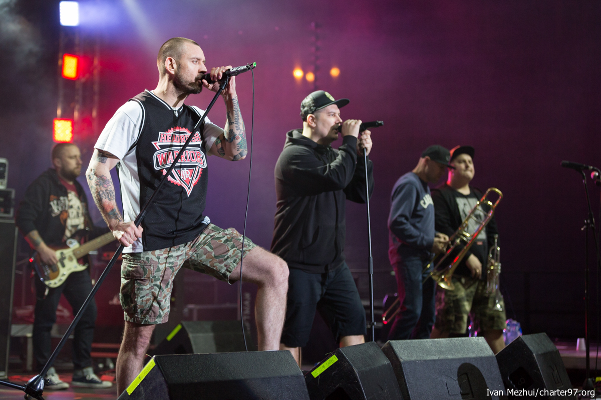 Koncert "Solidarni z Białorusią" 12 kwietnia 2014 roku na ul. gen. Tokarzewskiego-Karaszewicza w Warszawie.